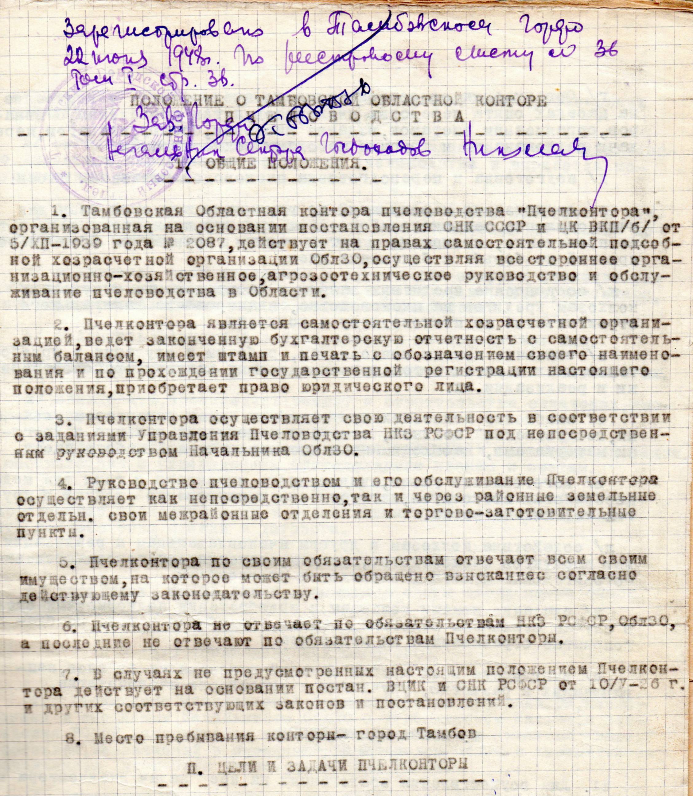 Тамбовское пчеловодство — Положение.